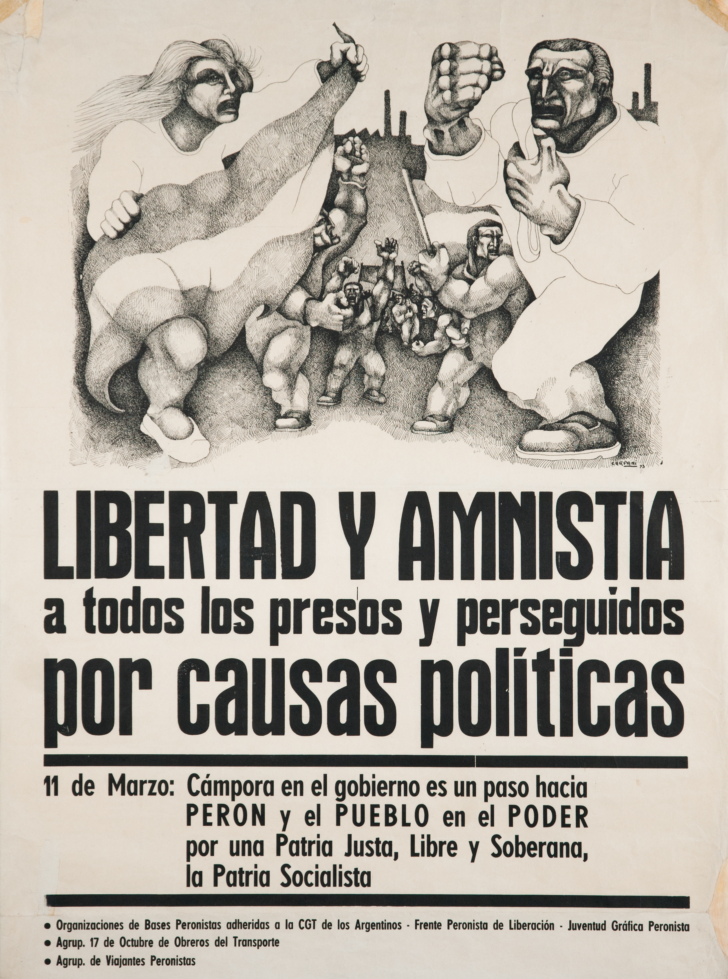 Afiche Libertad y amnistia.